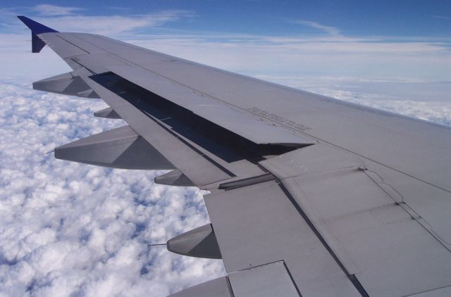 Tragflügel mit ausgefahrenen Spoilern A318/A319/A320/A321